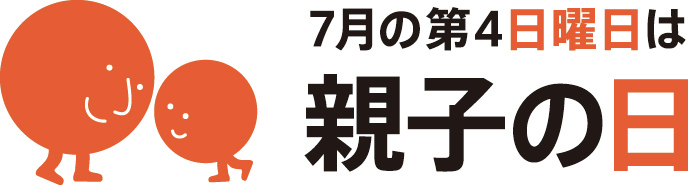 「親子の日」ロゴ